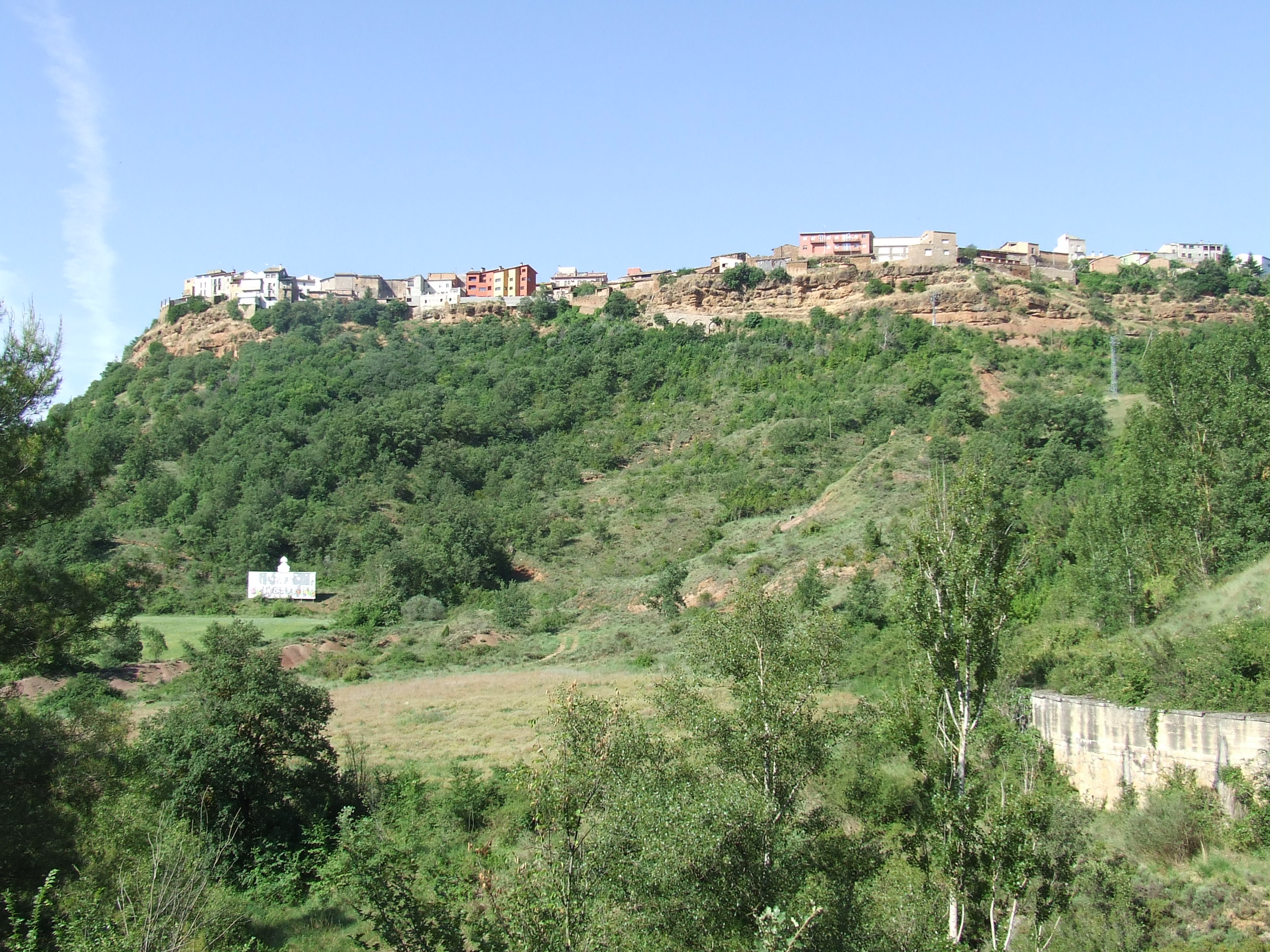 La vila de Talarn des del nord (Pallars Jussà)